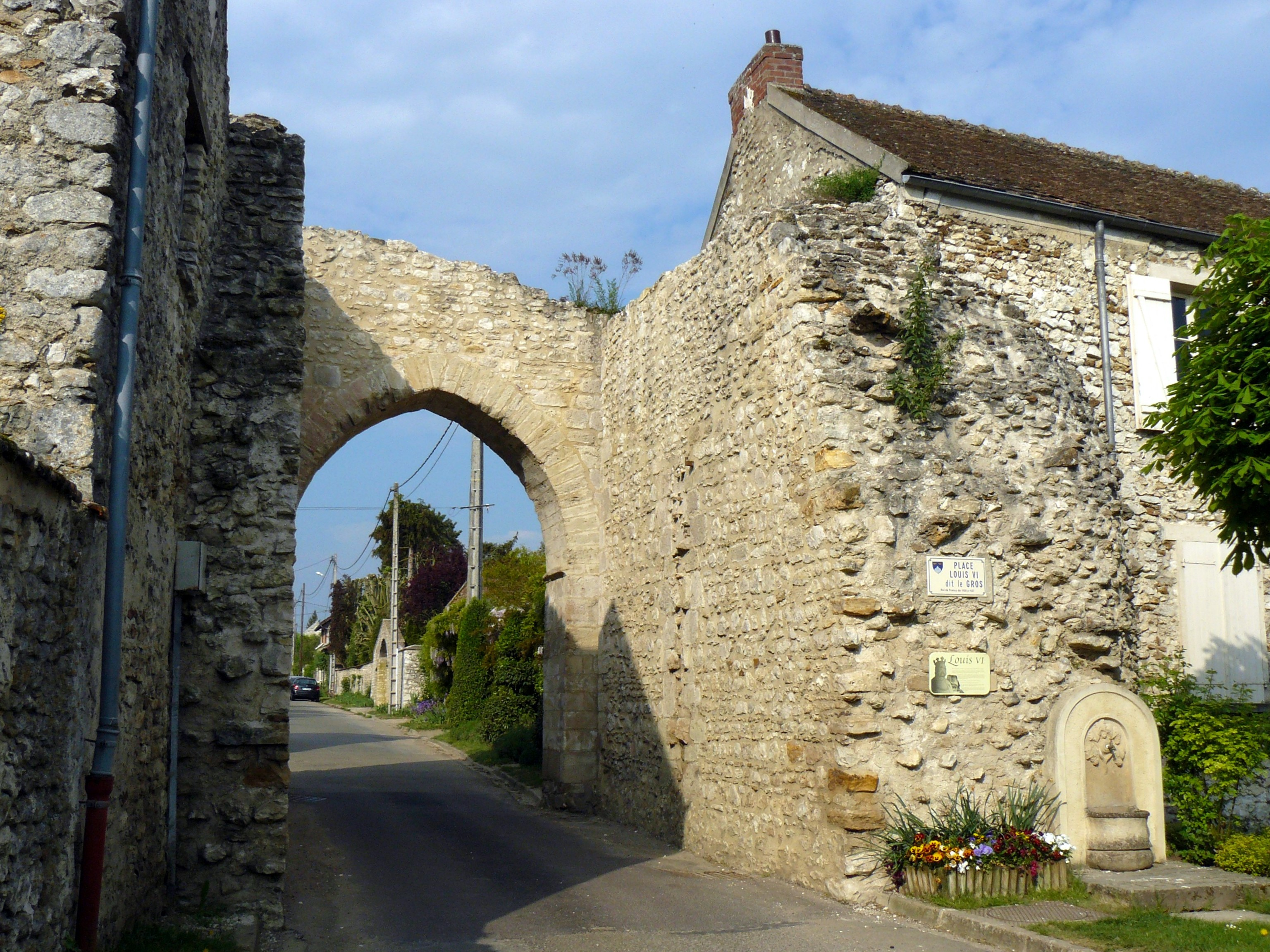 La Porte de Bretagne, vestige des fortifications de Montchauvet (Yvelines, France)